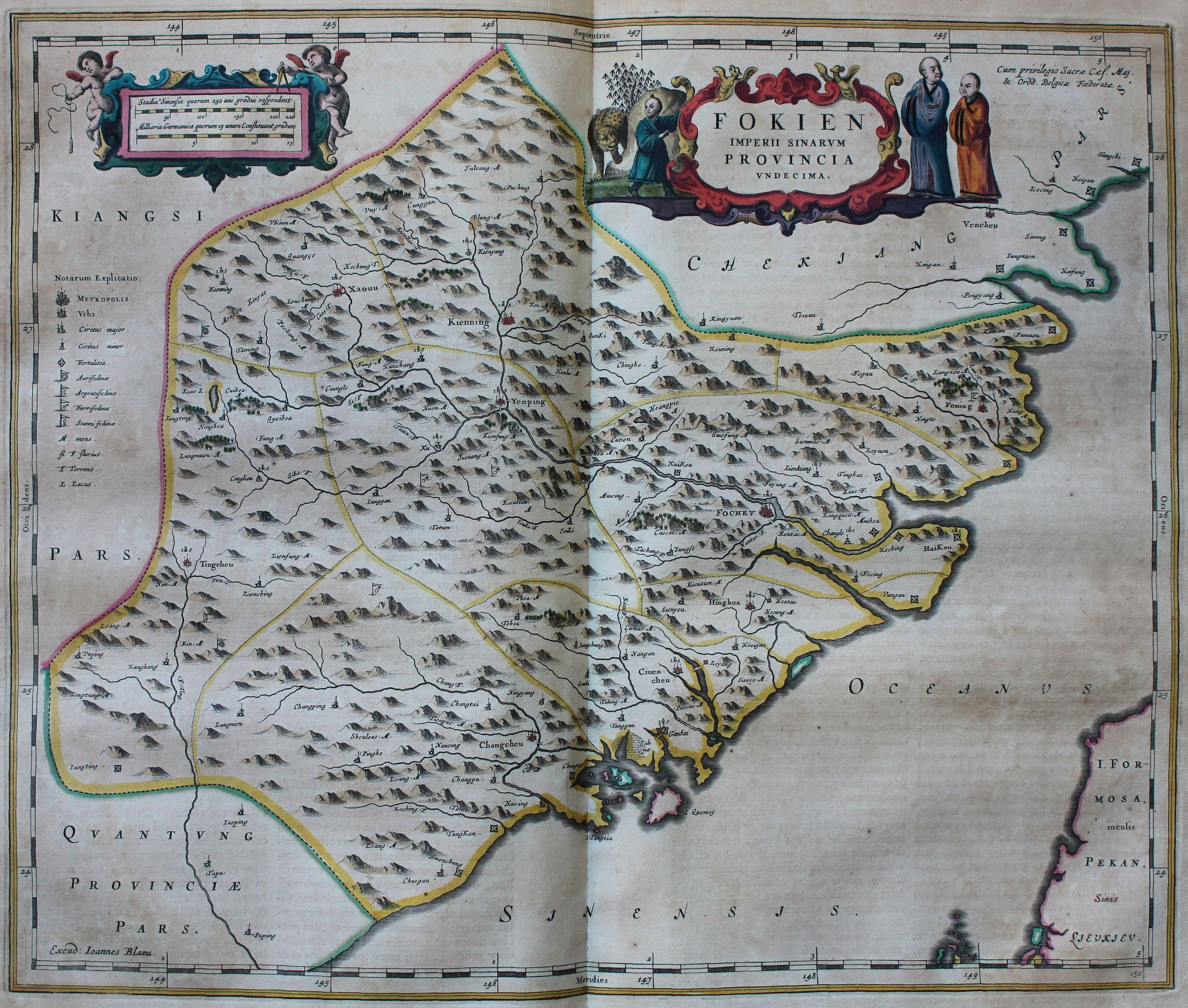 Descripción bibliográfica: Geographia Blaviana. - [Amsterdam : Juan Blaeu, 1659] . - [32], VI, 96 p., 34 f., h. 35a, 35b, 35c, 35d, 36-44 f., 34, [2], 36-40, [2], 43-70 [i. e. 75], [1] f., [20] p. de map., [9] f. de map., [4] f. pleg. de map., [2] f. de plan., [2] f. ge grab. : |bil. ; |cFol. marca major (57 cm.) . - En la dedicatoria a Felipe IV: "Presenta ... El Atlas Universal y Cosmographico de los orbes y terrestre ... Juan Blaeu" . - Título tomado del frontispicio. -- Privilegio fechado en 1659. -Errores de pag. - Sign.: 1, *2, **3, ***-****2, a-e2, A-I2, K1, L-Z2, Aa-Dd2, 4 2, Ee-Ff2, A-I2, K1, L2, M1, N-Y2, Z5, Aa-Dd2, Ee1, A-D2, E-F1, G-I2, K-L1, M-O2, P1, Q-Z2, Aa-Bb2, Cc1, Dd3, Ff-Zz2, Aaa-Bbb2, . - Frontispicio grab. col. -- Incluye un total de 49 il. entre map., plan. i grab. Materia: Atlas - Obras anteriores a 1800 Impresor: Blaeu, Joan, 1596-1673, imp. Lugar de impresión: Holanda. Amsterdam Localización: Vea la ilustración en su contexto Visite también la exposición "Cartografía histórica en la Biblioteca de la Universidad de Sevilla"